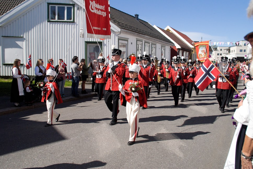 Haukerød Skolekorps 17. mai 2016 i Sandefjord. Hovedkorpset med fortropp.